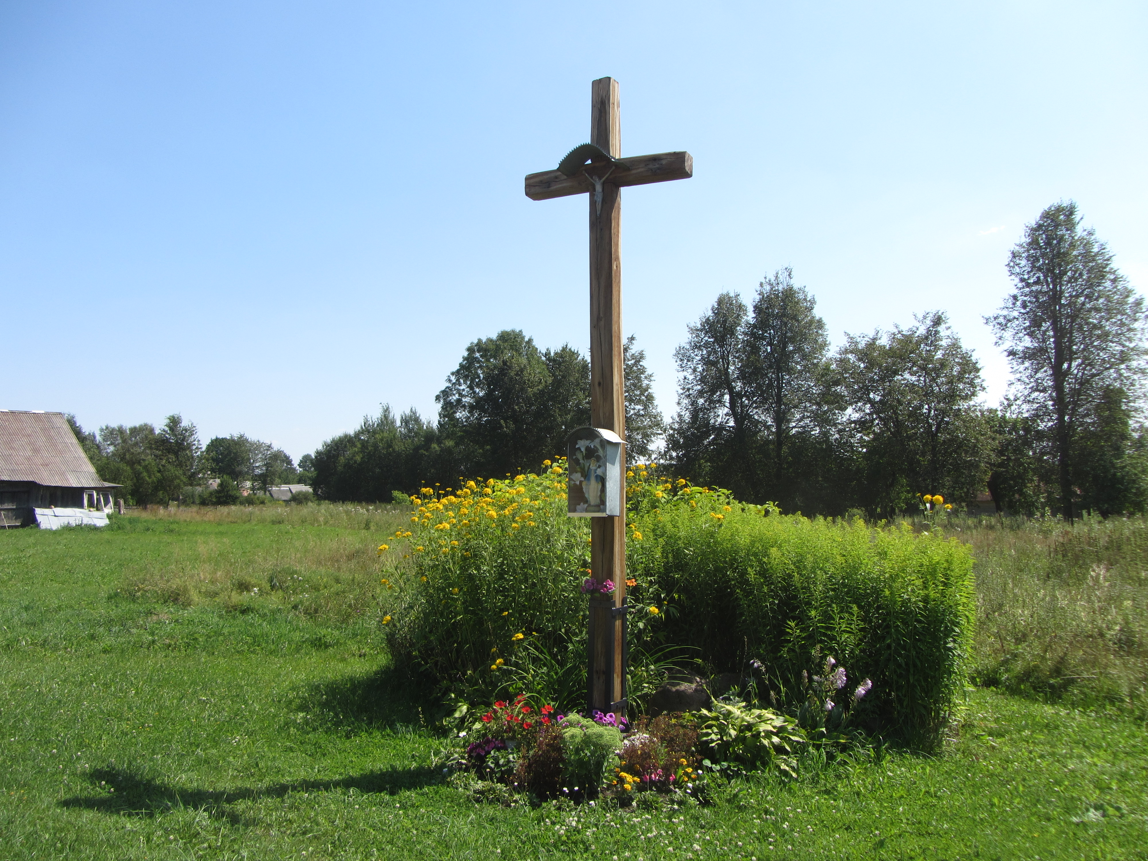 Rutkiškės, Lithuania